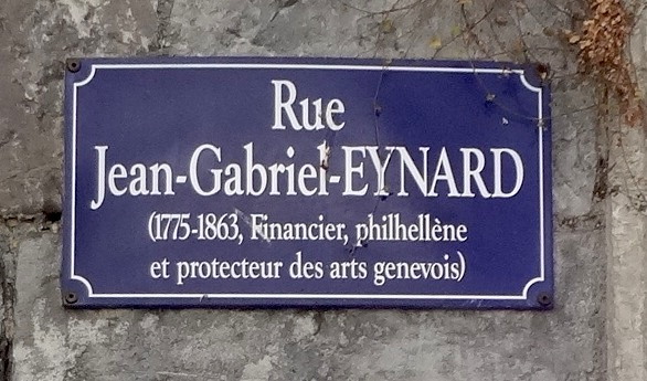 Plaque de la rue Jean-Gabriel Eynard à Genève